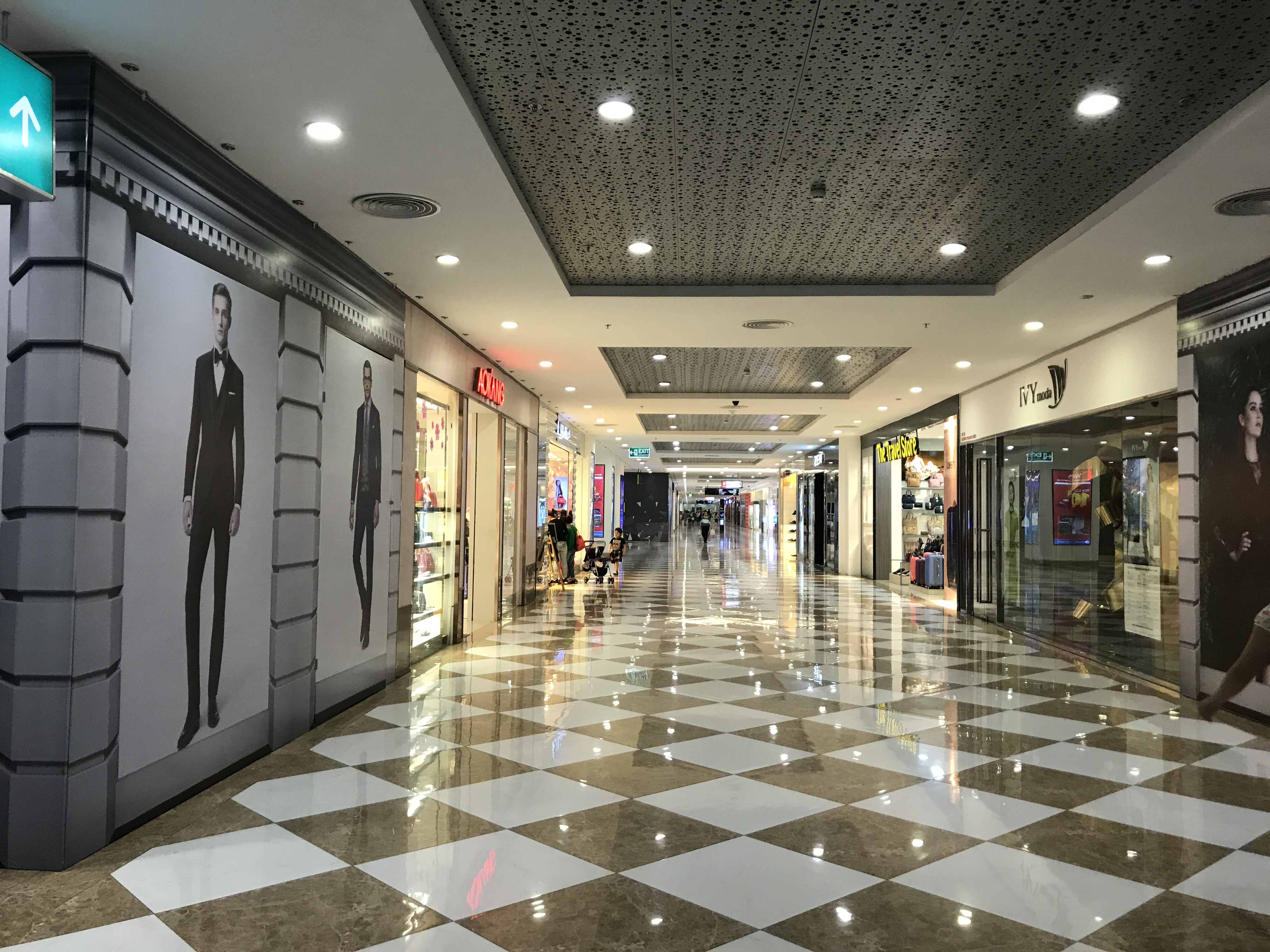 Vincomes Magemall Times City